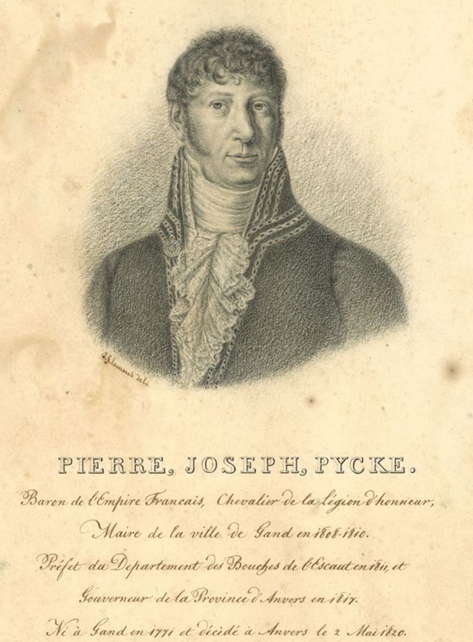 Pierre Joseph Pycke